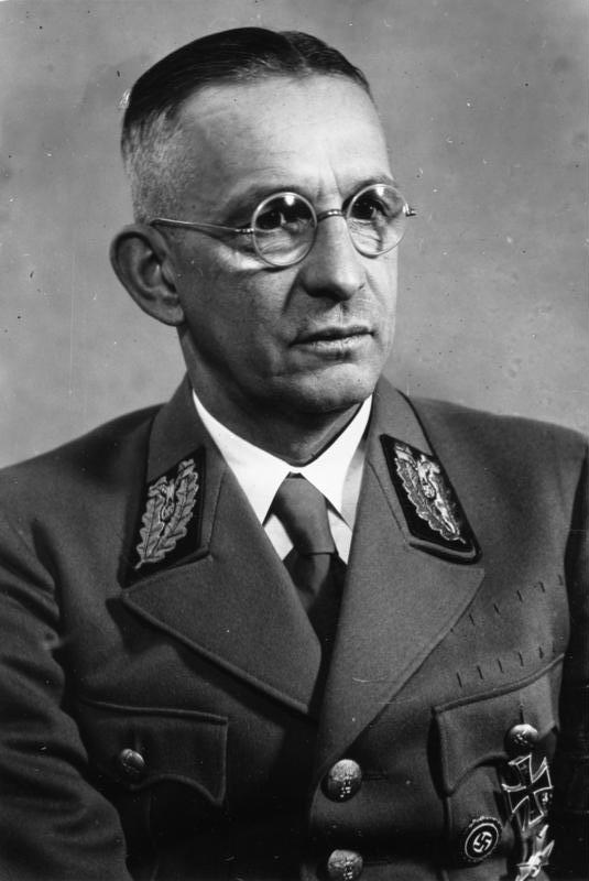 Alfred Meyer ADN-Bildarchiv [Porträt]Alfred Meyer, (1891-1945) Gauleiter der NSDAP, ab 1941 Staatssekretär im Reichsministerium für die besetzten Ostgebiete und Stellvertreter des Reichsministers. Aufn.: November 1941 Abgebildete Personen: Meyer, Alfred: SA-Obergruppenführer, Stellvertreter Rosenbergs, Deutschland